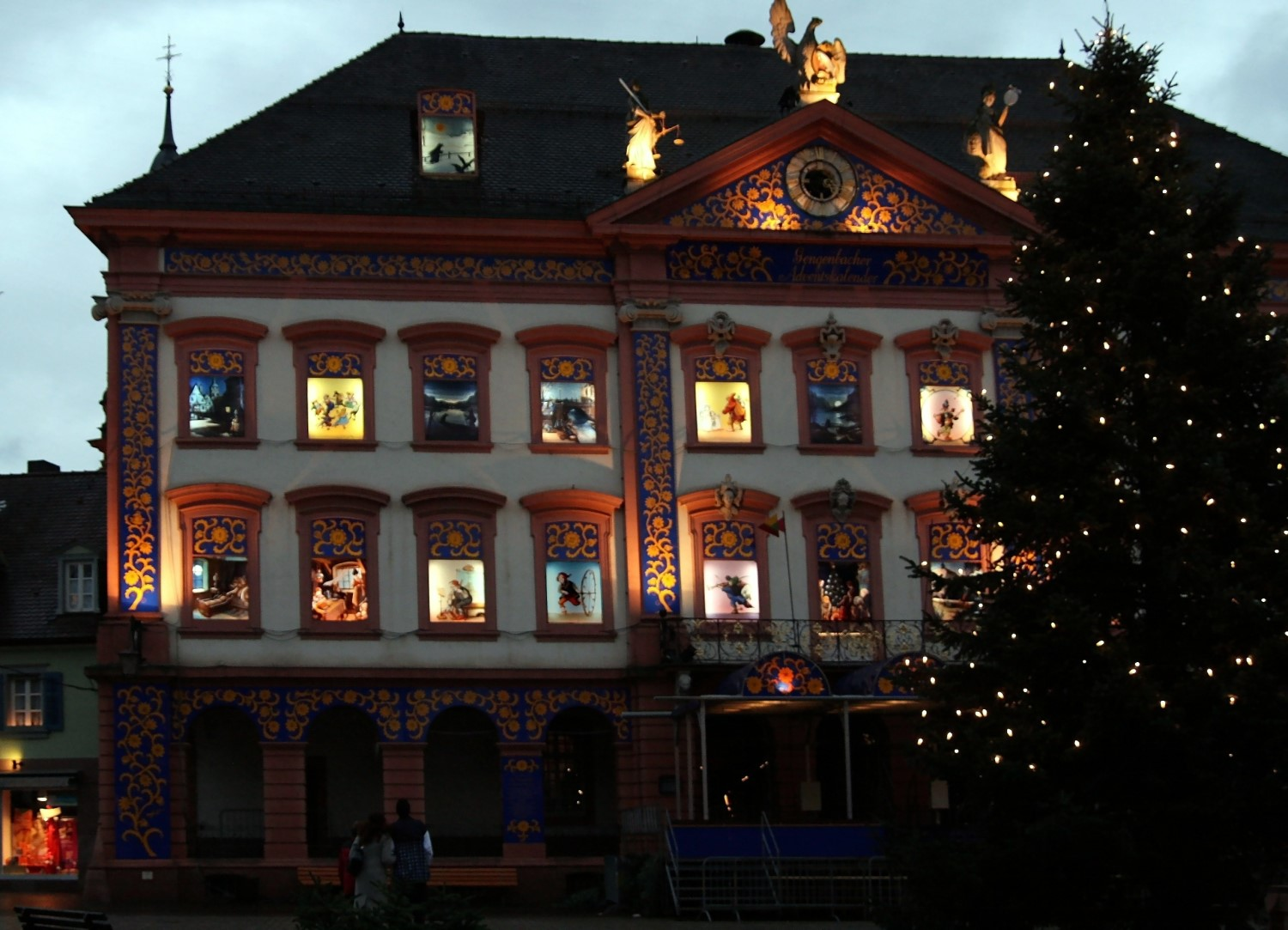 Adventskalender am Rathaus von Gengenbach